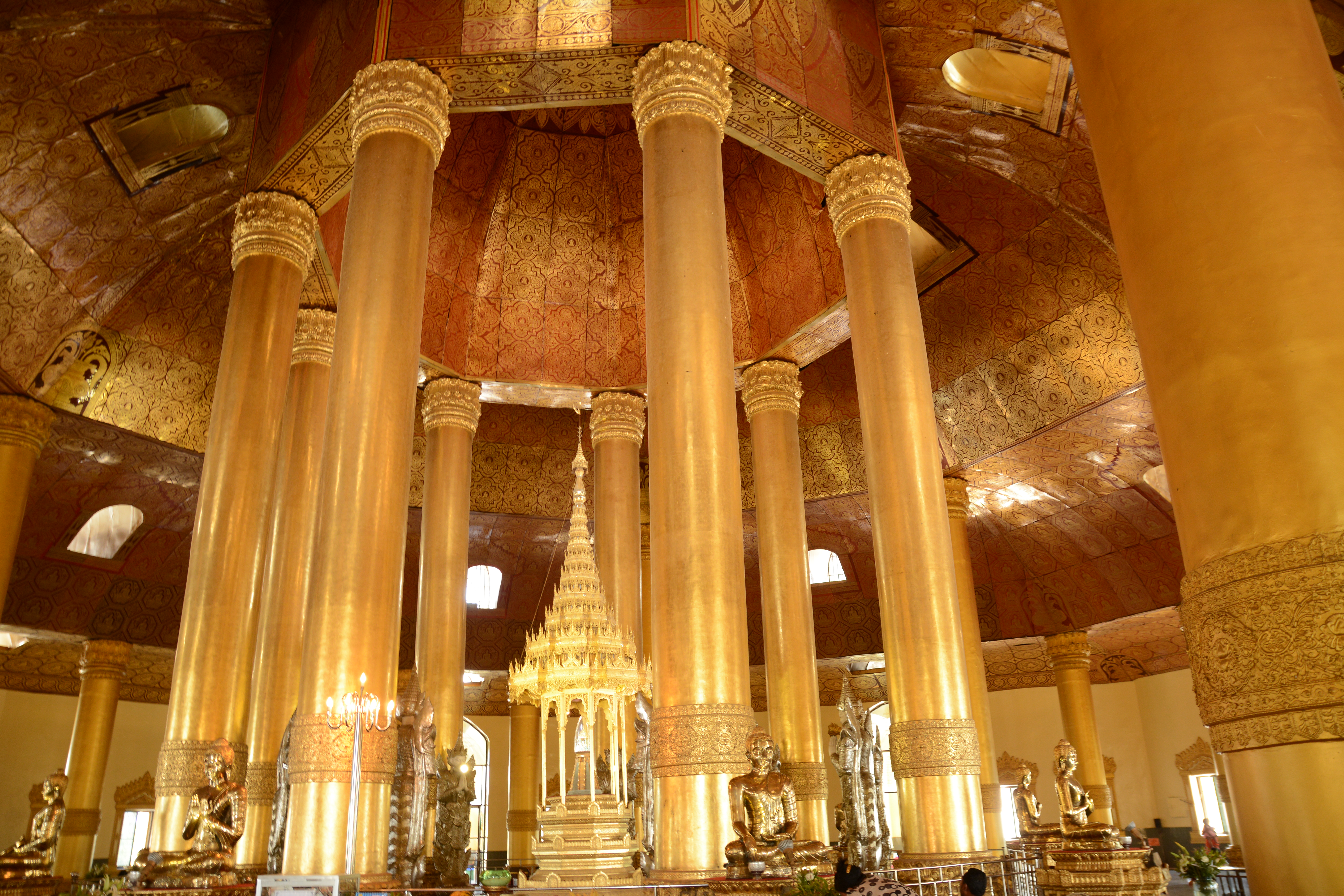 Swe Taw Myat Paya Myanma Yangon